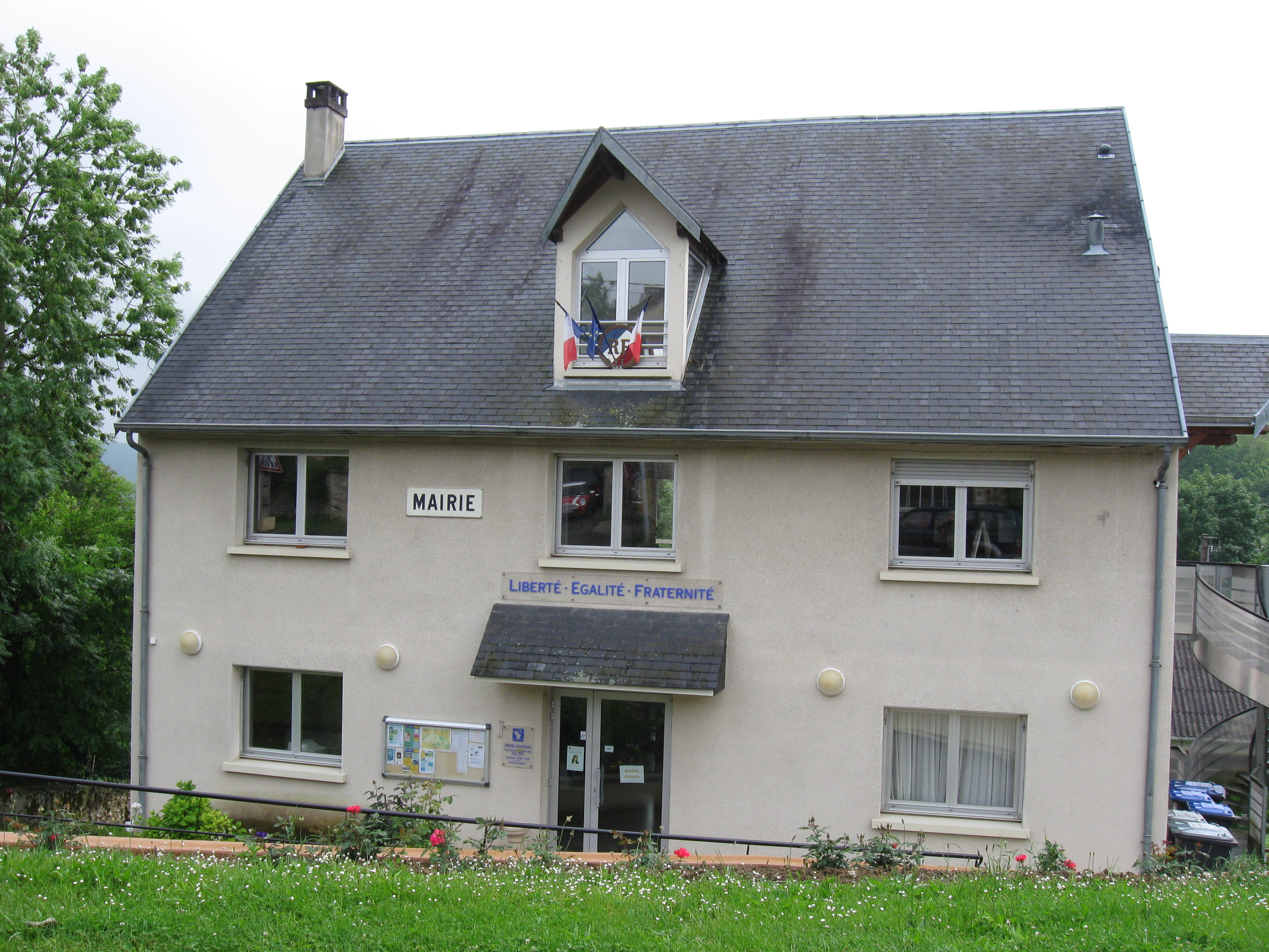 Mairie de Sainte-Aulde. (département de la Seine-et-Marne, région Île-de-France).